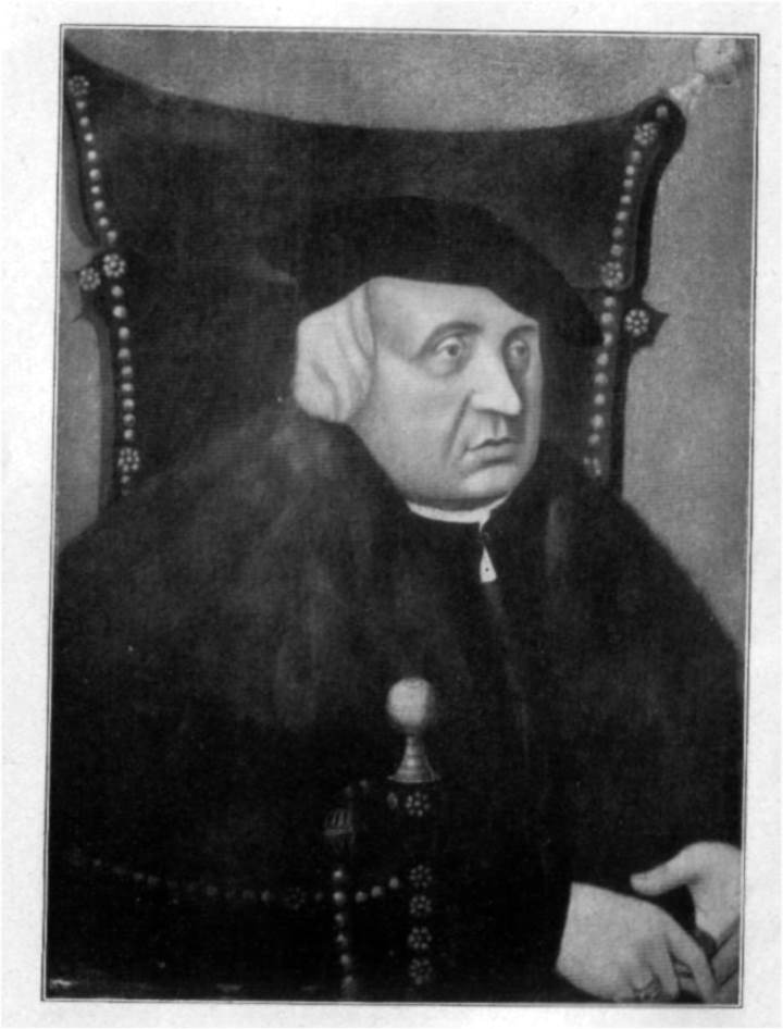 Botho der Glückseelige